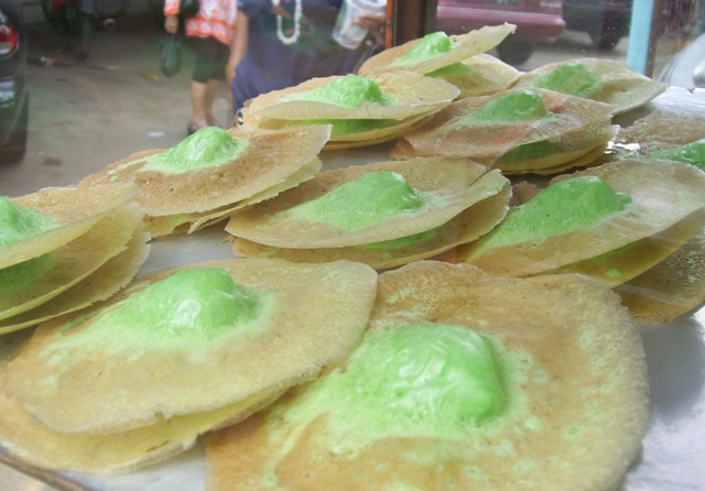 kue ape/ kue tetek